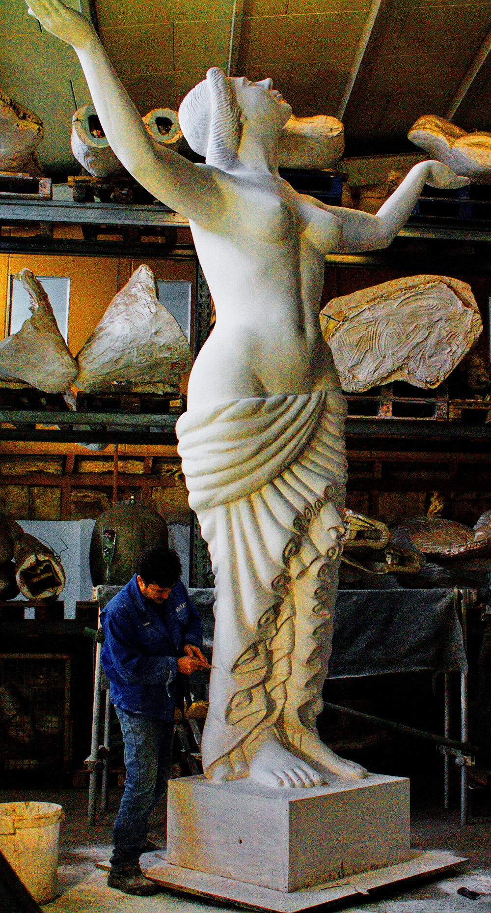 پەیکەری فوارەی دادپەروەری، فوپەرتاڵ ئەلەمانیا ٢٠١١